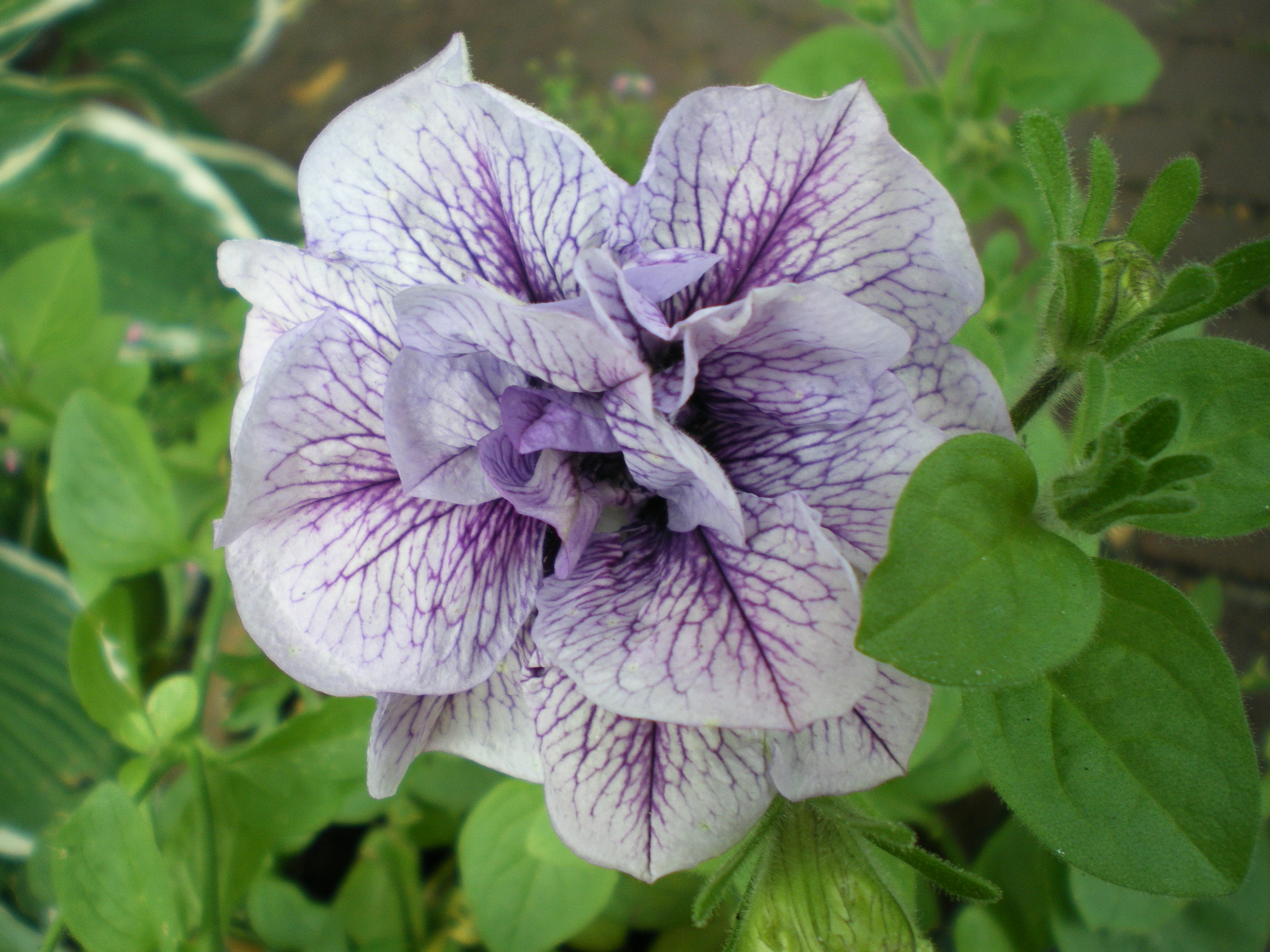 Petunie Hybride "Sweet Sunshine" in Garten